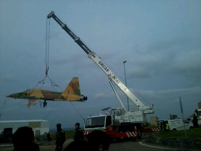 Día en el que se retira el avión que formaba parte de la rotonda de Castuera durante muchos años.